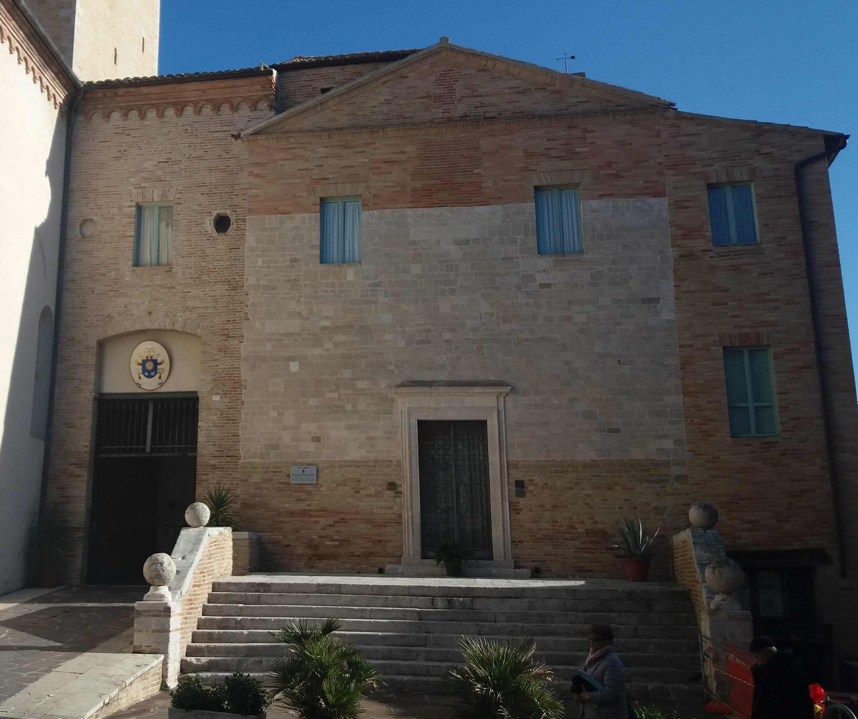 Ingresso del cortile interno dal quale si accede al battistero